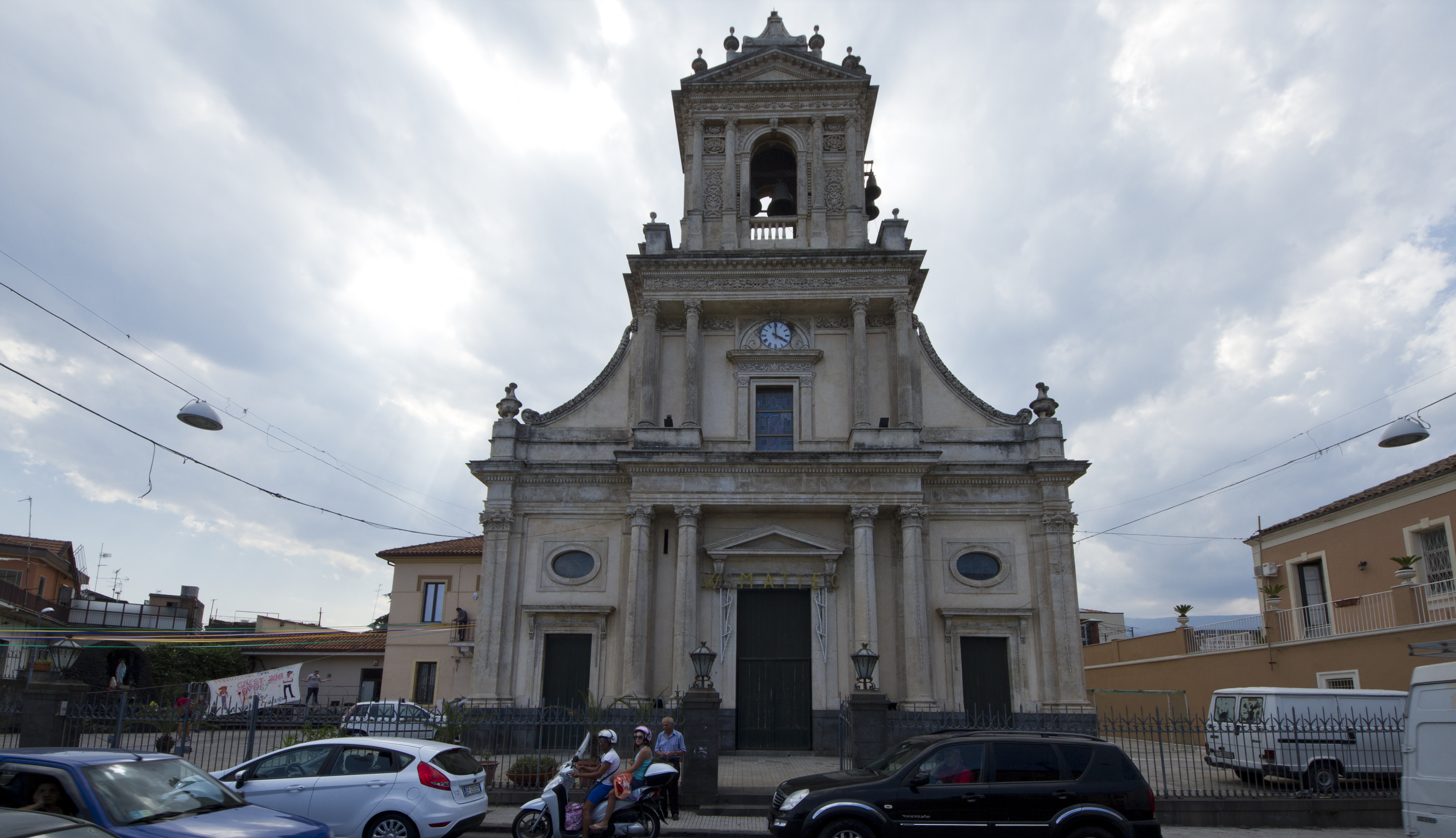 Chiesa di San Matteo, Trepunti, frazione di Giarre, Catania, Sicily, Italy